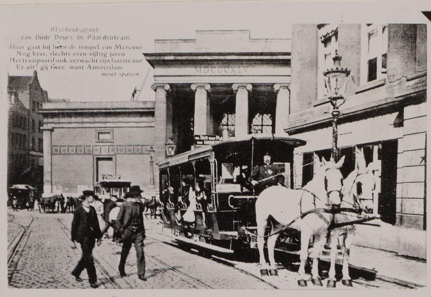 Afscheidsgroet van Oude Beurs en Paardentram. Foto. Afmetingen onbekend. Amsterdam, Stadsarchief Amsterdam, collectie foto-afdrukken.